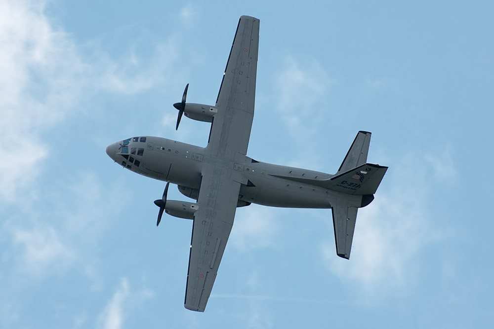 Alenia C27J Spartan